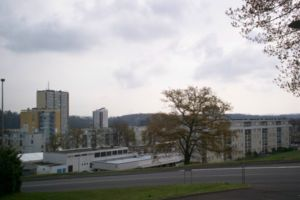 Morencs vila navèra